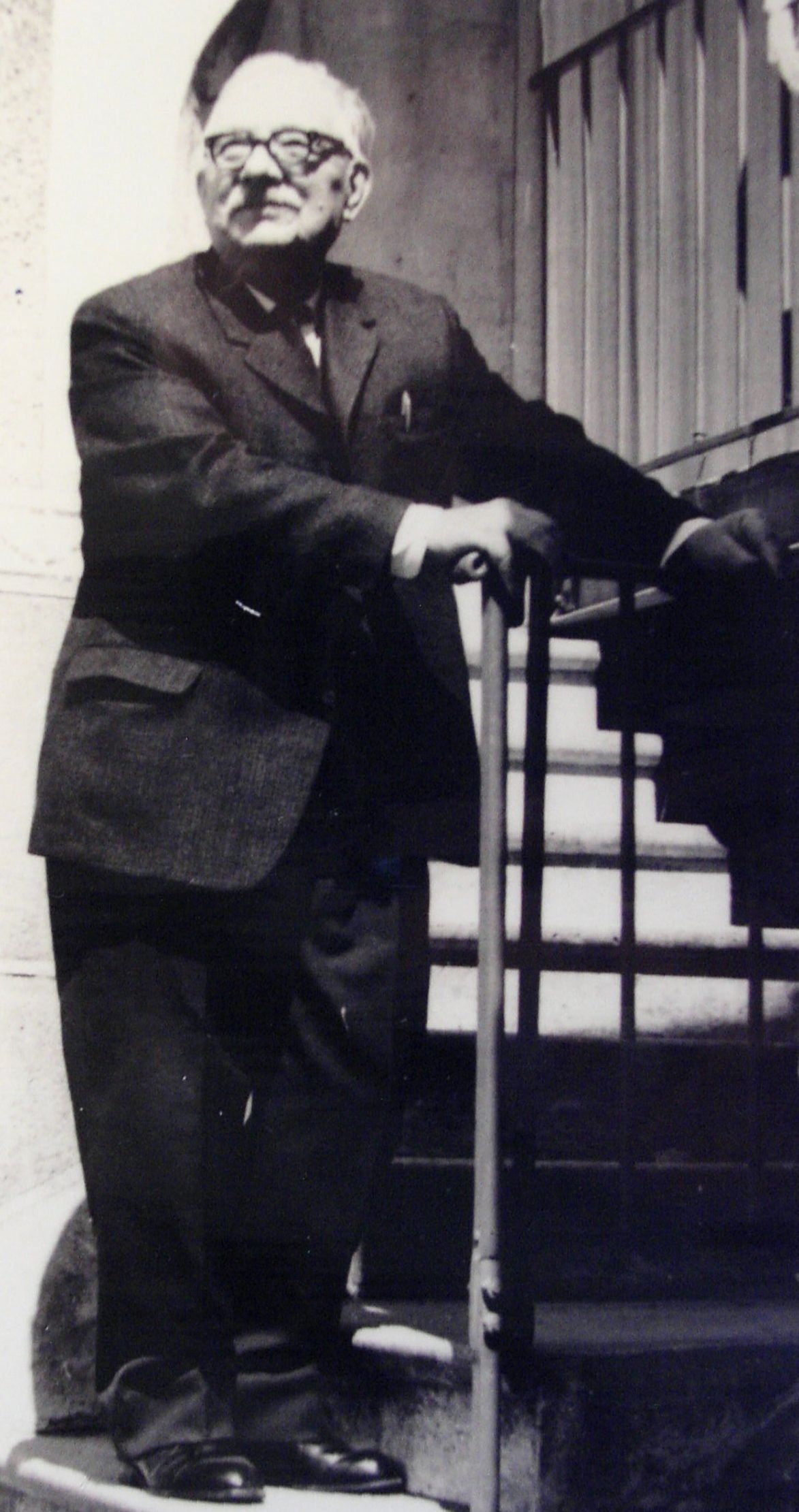 Marius Ribon auteur de "Saint-Andéol-de-Berg - Notice historique"